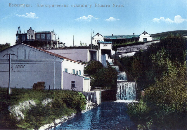 První vodní elektrárna na světě, pracující v energetickém systému